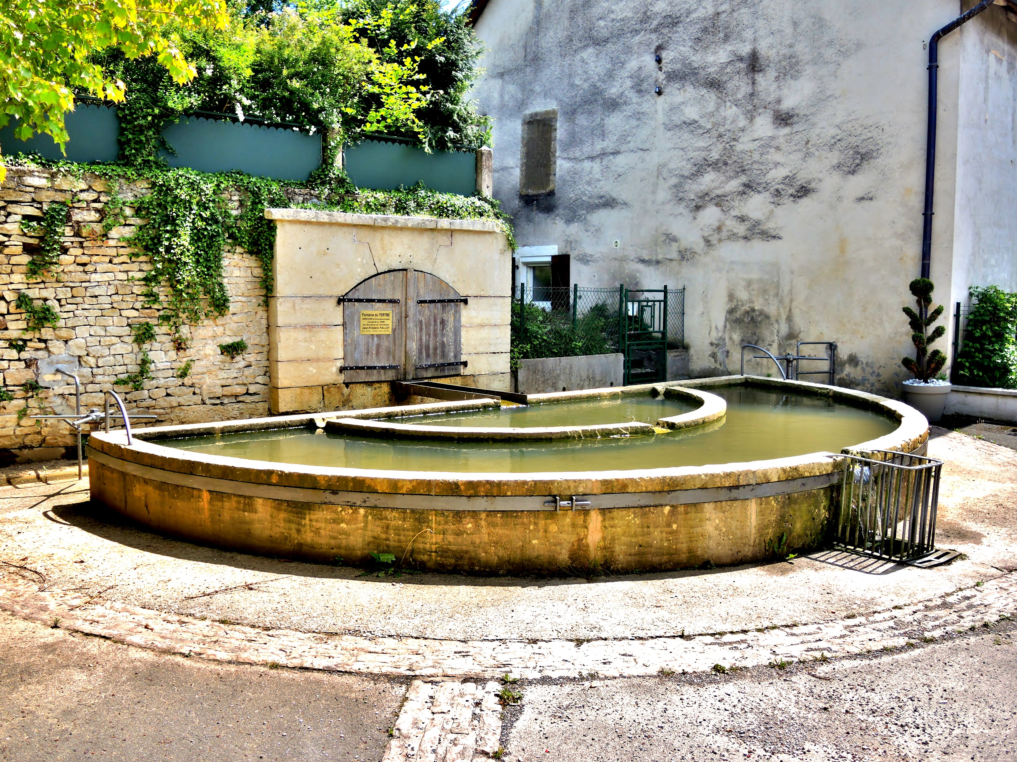 Fontaine-abreuvoir du tertre. Allenjoie. Doubs